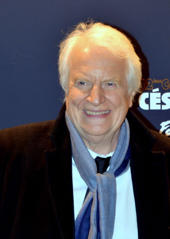 André Dussollier à la cérémonie des César